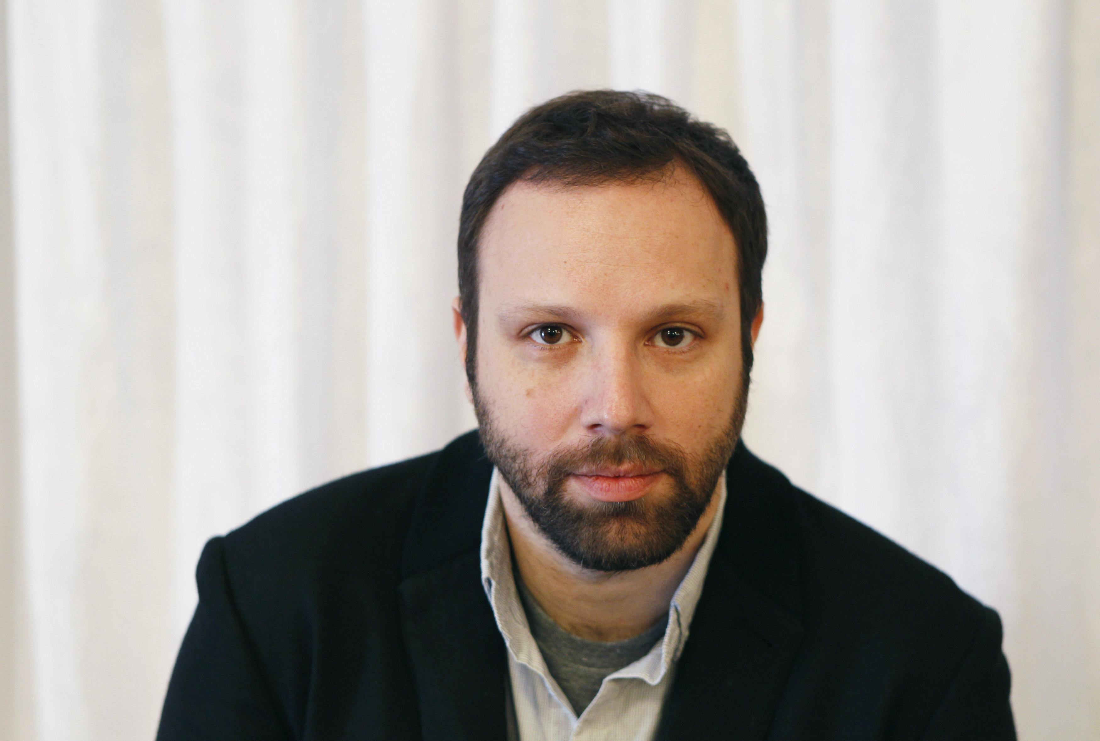 Γιώργος Λάνθιμος